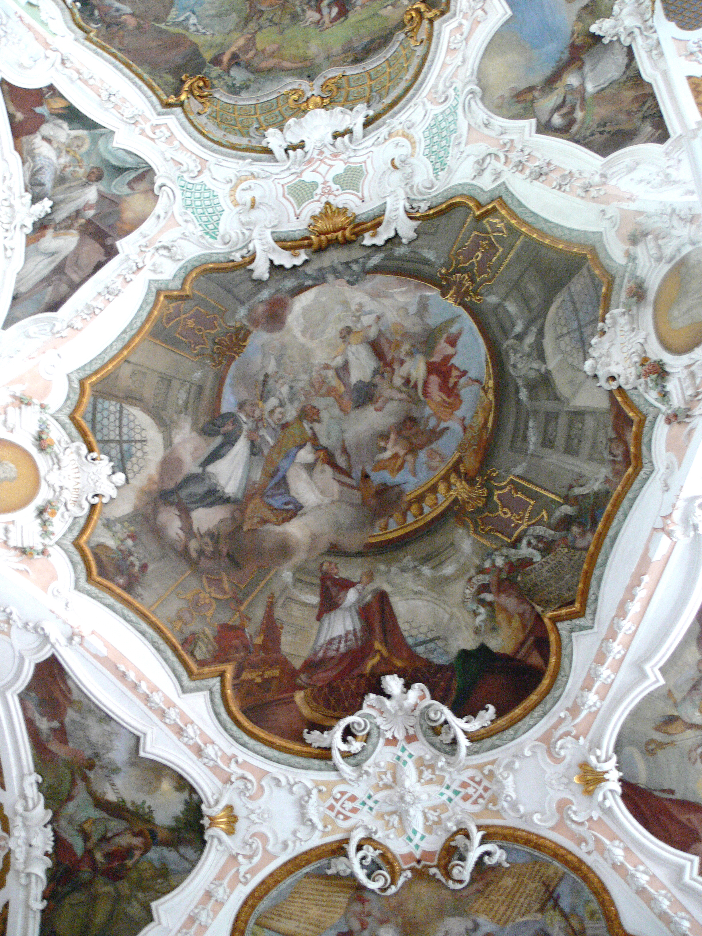 Abteikirche St. Martin, Beuron Deckengemälde Joseph Ignaz Wegscheider: Verklärung des hl. Augustinus